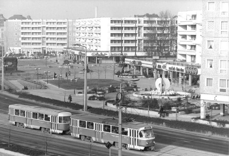 Dresden, Neustädter Markt, Wohnblocks, Straßenbahn ADN-ZB Häßler 11.2.82 Dresden: Der Neustädter Markt erstand in den vergangenen Jahren durch die fleißige Arbeit vieler Bauleute aus dem Bezirk und der Stadt Dresden neu. Dieser Platz ist Ausganspunkt für den Fußgängerboulevard Straße der Befreiung. Beim Luftangriff auf Dresden am 13. Februar 1945 wurde auch die Gegend um den Neustädter Markt total zerstört. (siehe zur Gegenüberstellung Archivfoto 0309-331N) Information added by Wikimedia users.